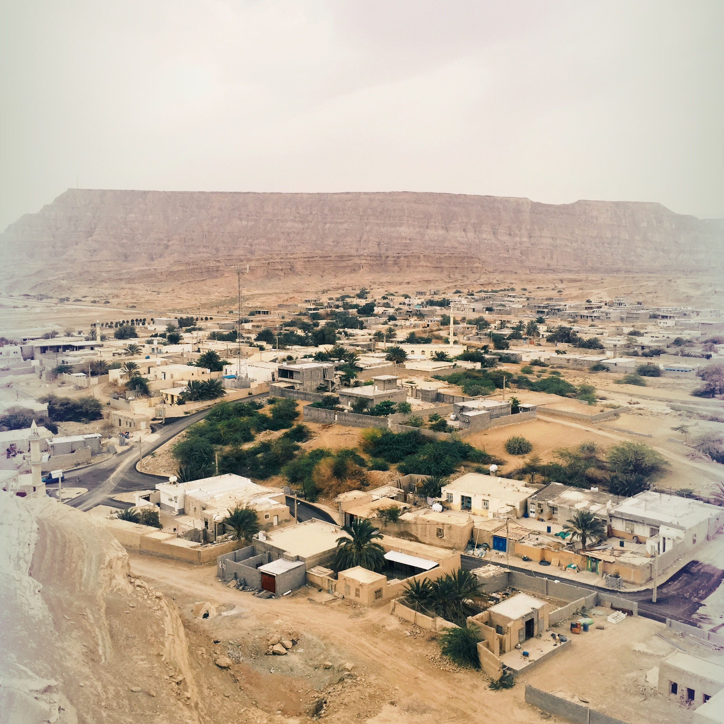 این عکس در زمستان سال 1395 از کوهی مشرف به بندر بستانو به نام کوه پر توسط محمد درویشان گرفته شده است .